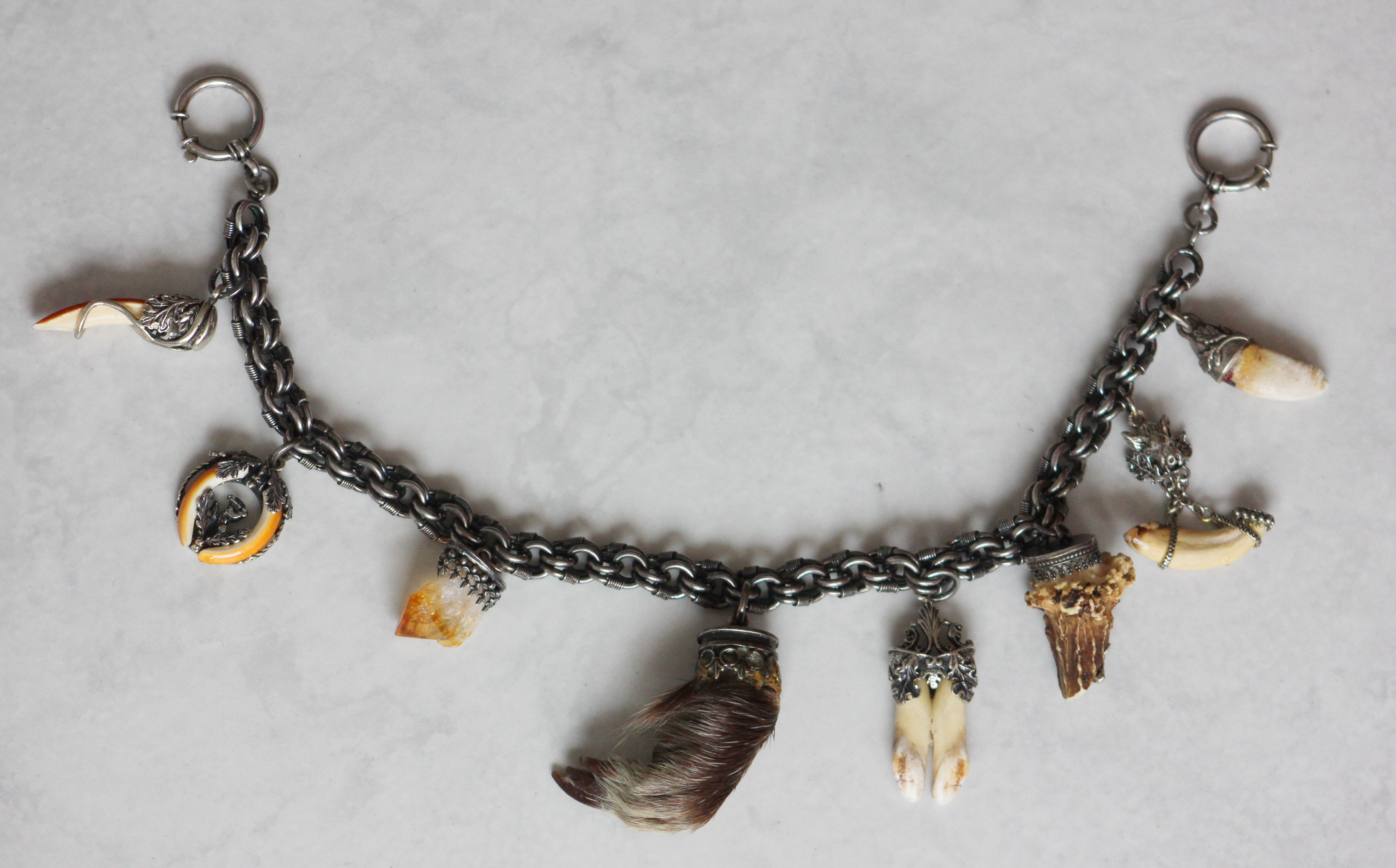 Charivari oder auch Bauchkette. Volkloreschmuck aus Bayern und Österreich.